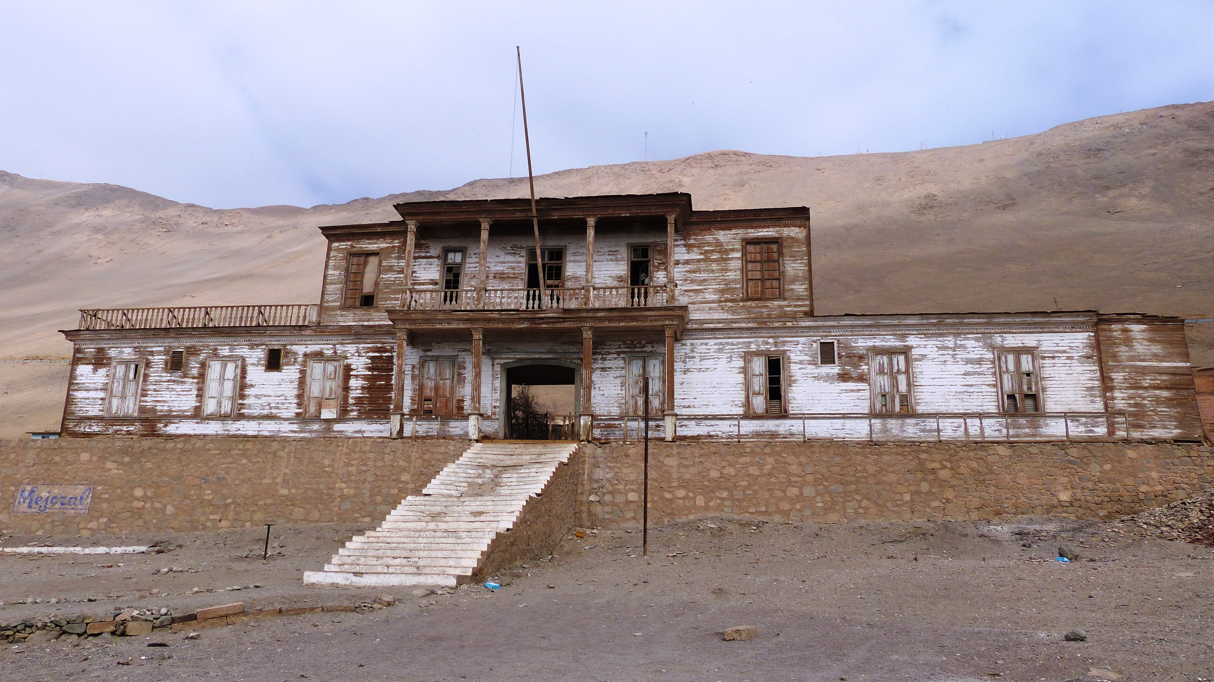 Hospital de Pisagua This is a photo of a national monument in Chile: 286